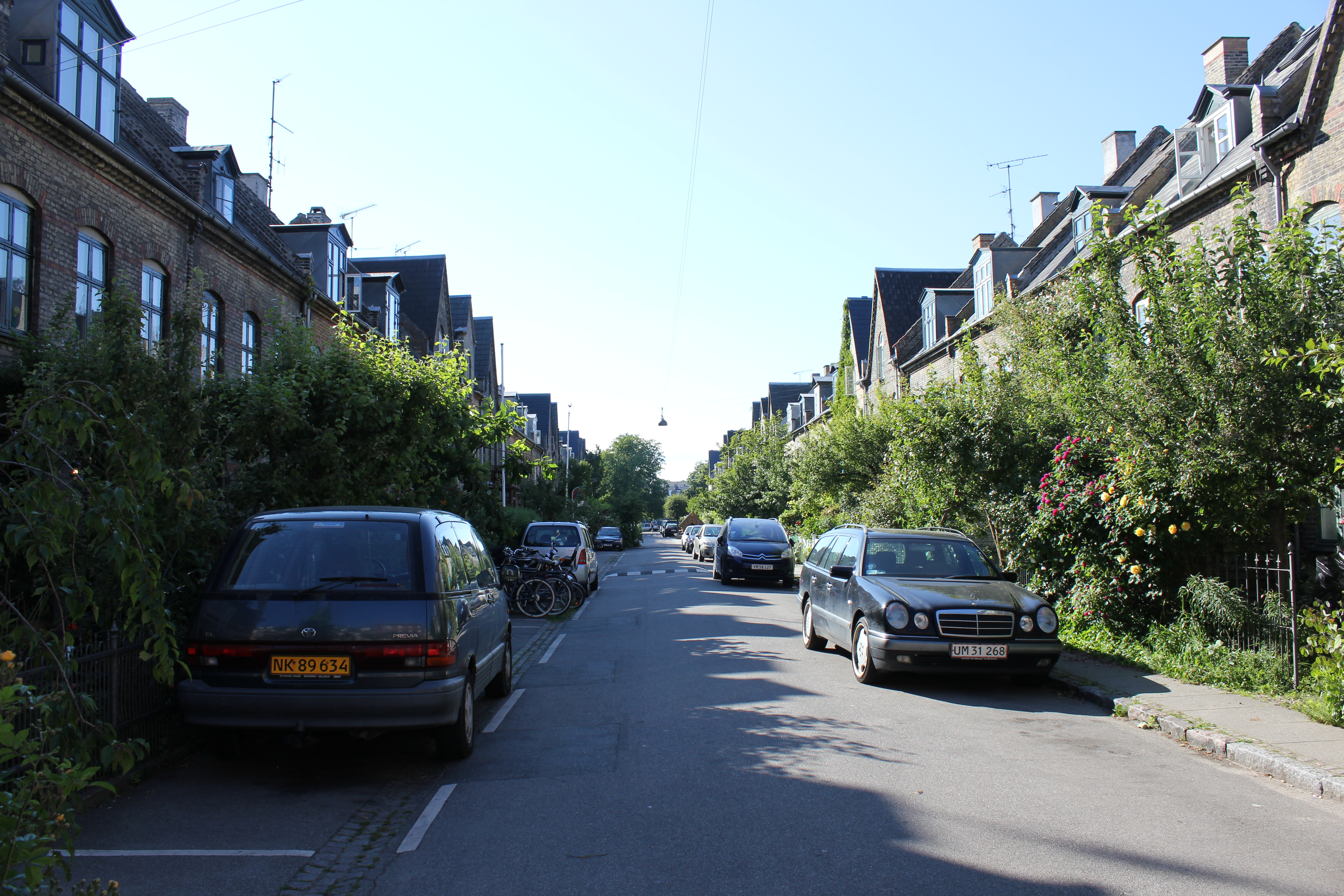 Kartoffelrækkerne, a neighborhood in Copenhagen